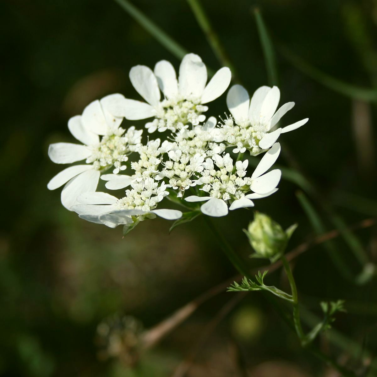 Großblütige Strahldolde (Orlaya grandiflora), Doldenblütler (Apiaceae) - Ungarn/Magyarország/Hungary: Pest megye, Steinbruch SE Dunabogdány